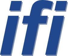 Logo des Instituts für Islamfragen